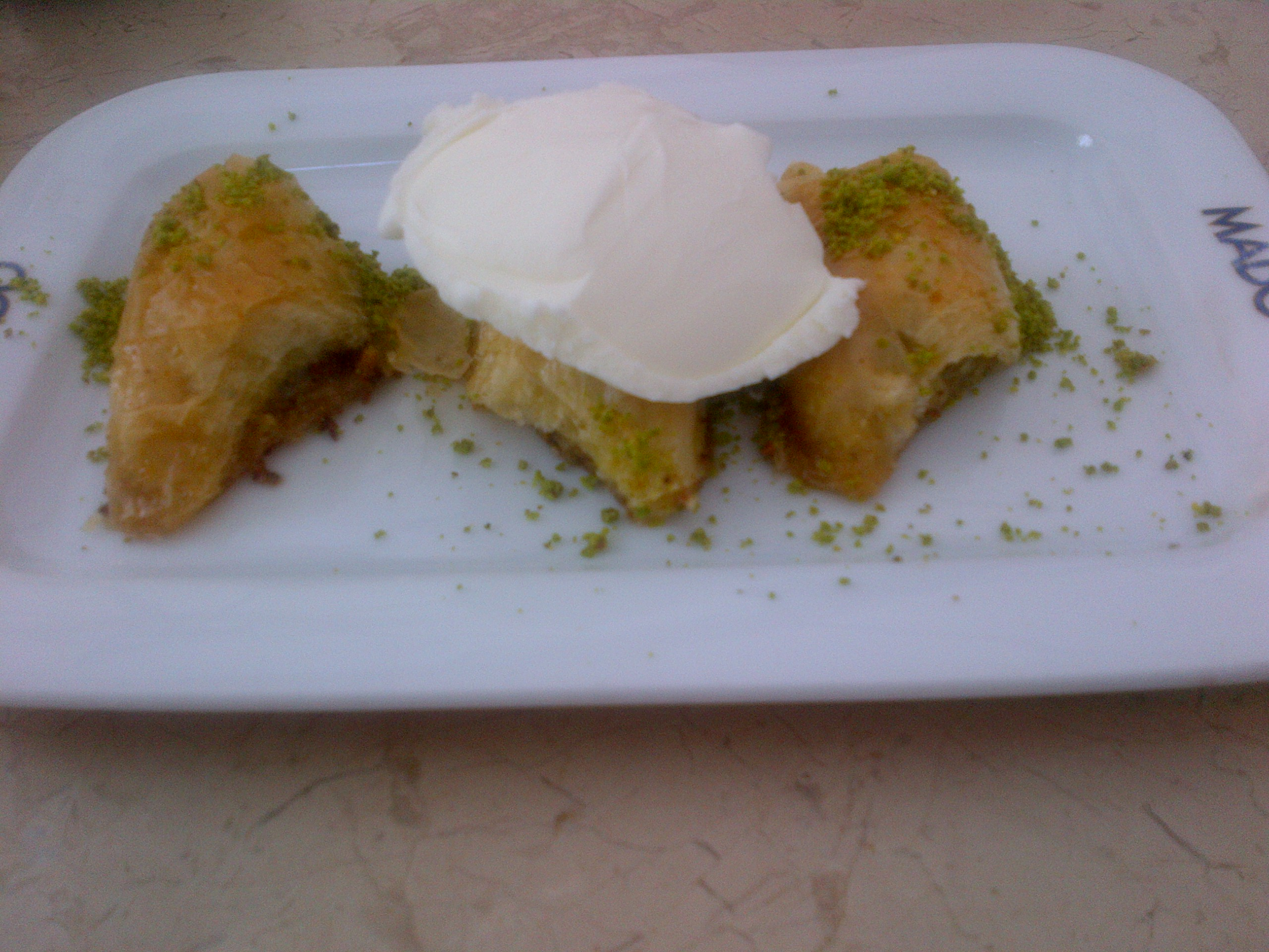 Şöbiyet con Maraş dondurması.